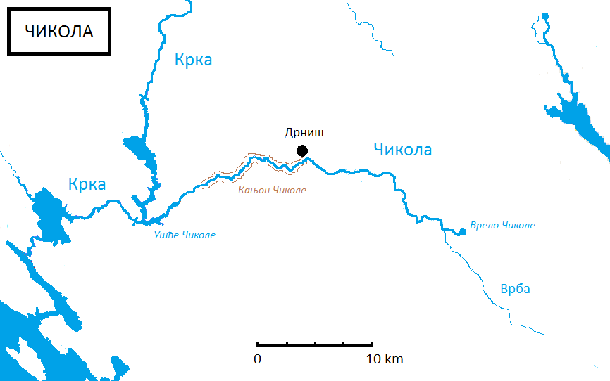 Ток ријеке Чиколе